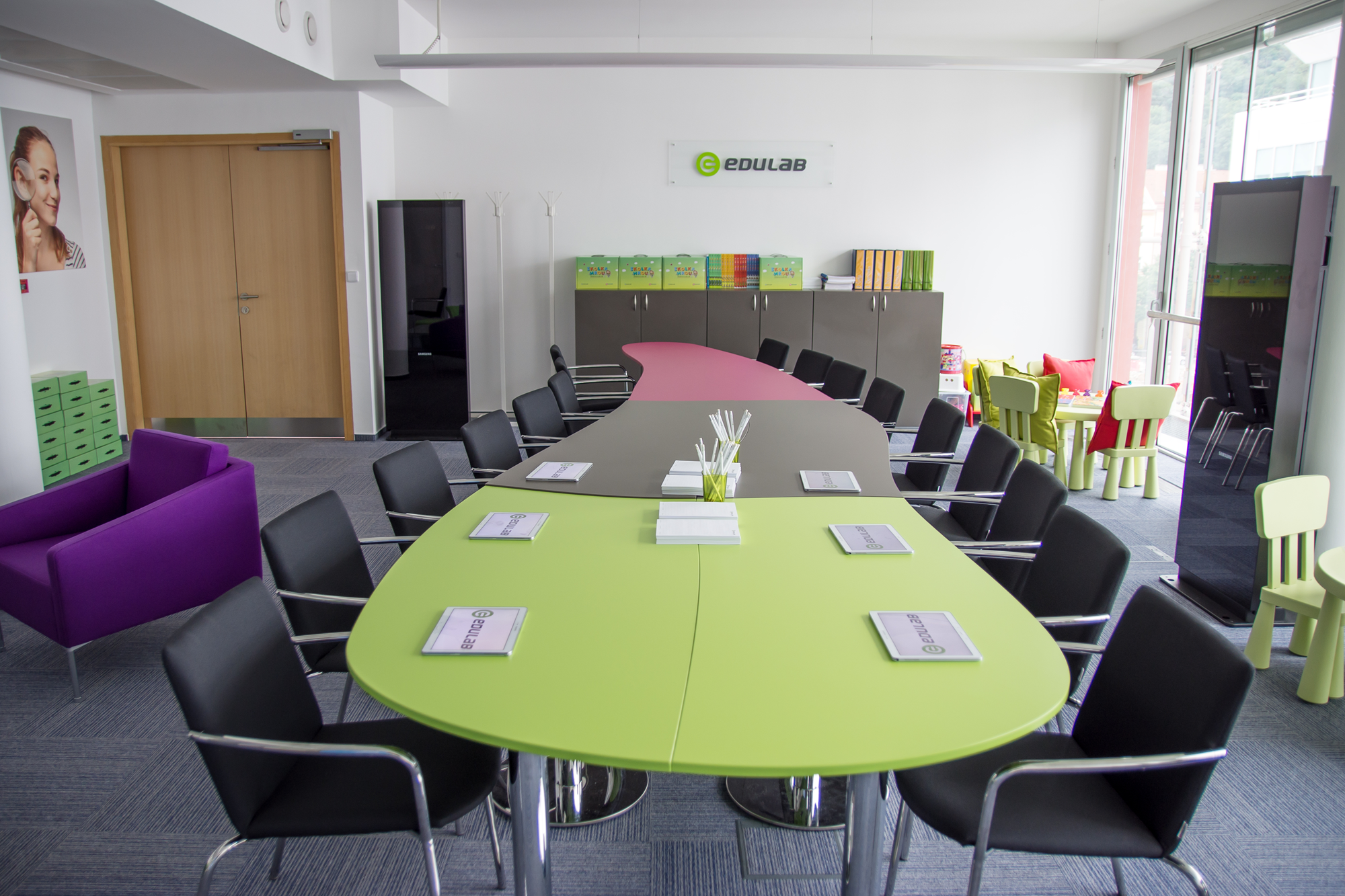 EDUkační LABoratoř (EDULAB) v CORSO Karlín